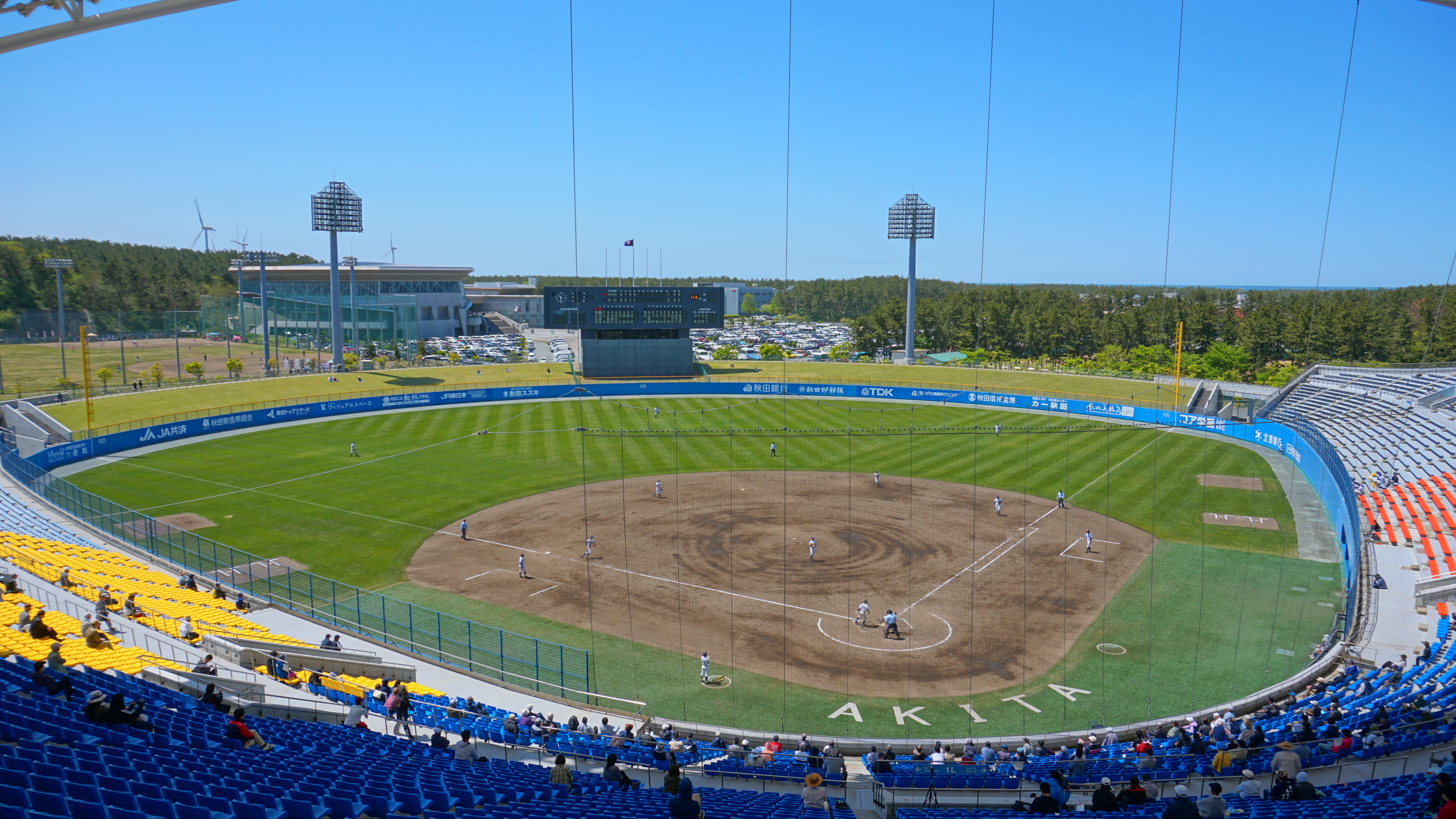 秋田県立野球場（秋田こまちスタジアム）